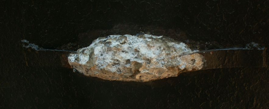 Zinkanode, gebruikt.